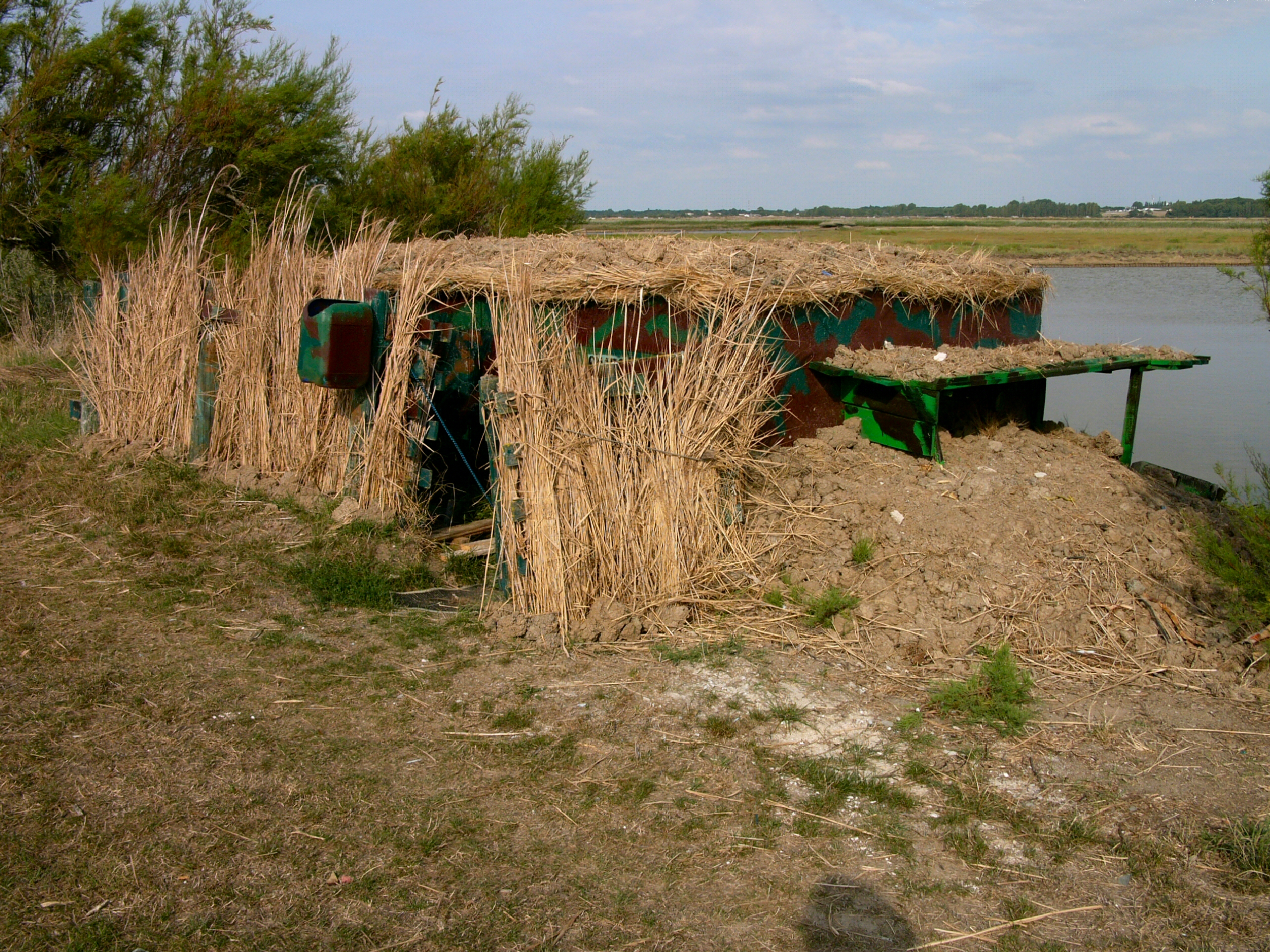 Tonne de Chasse dans le Marais de Flandre et de la Cabane Fouras Charente Maritime France